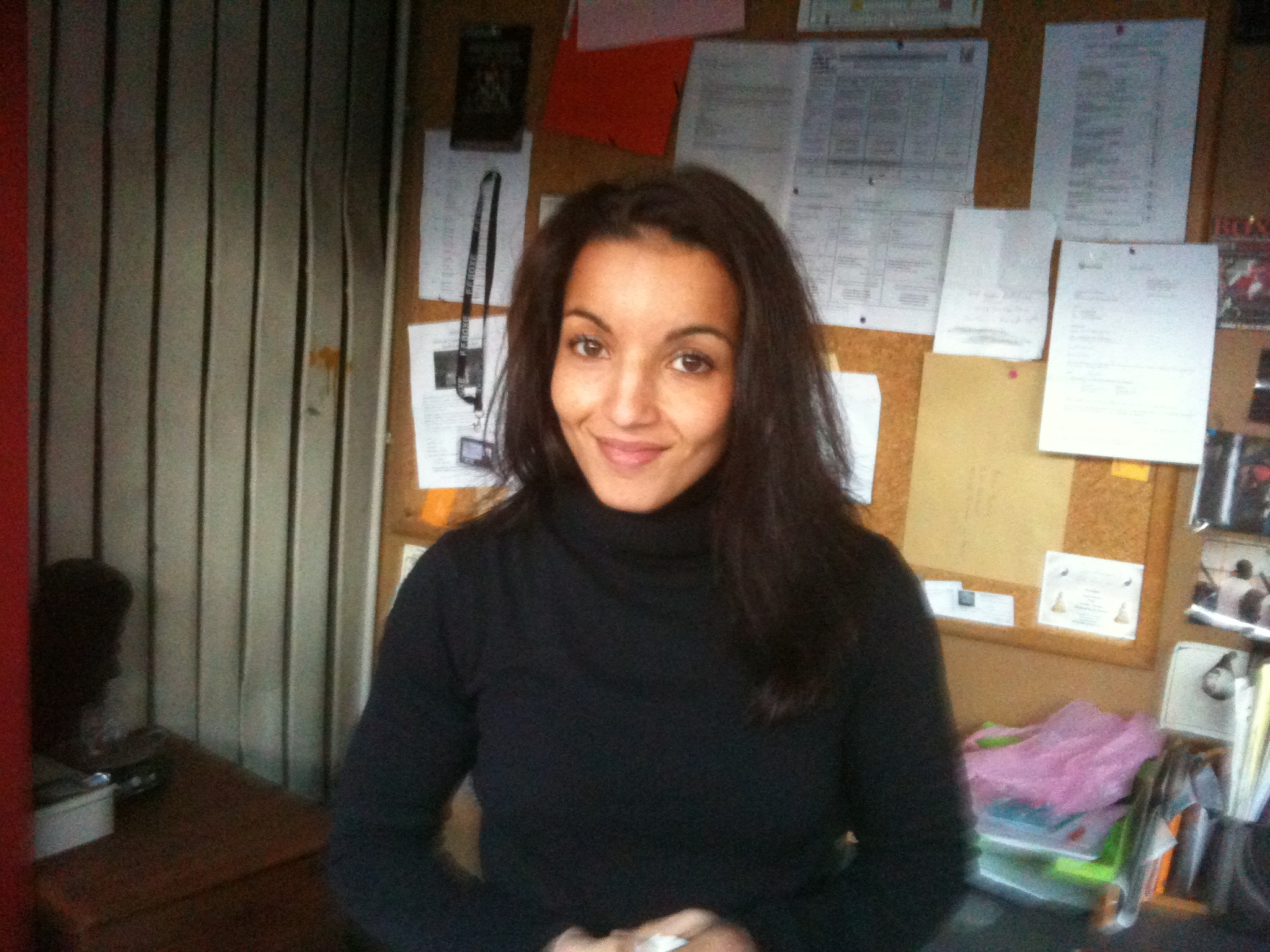 La boxeuse française Sarah Ourahmoune en novembre 2011